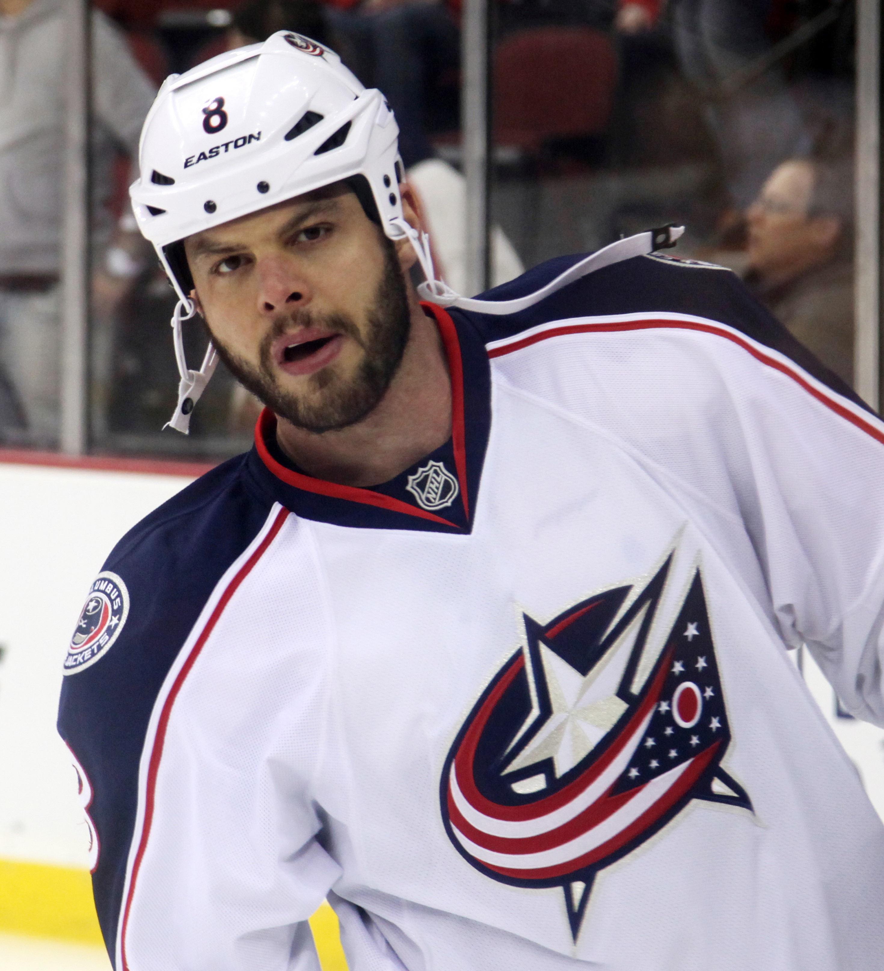 Horton in 2014.